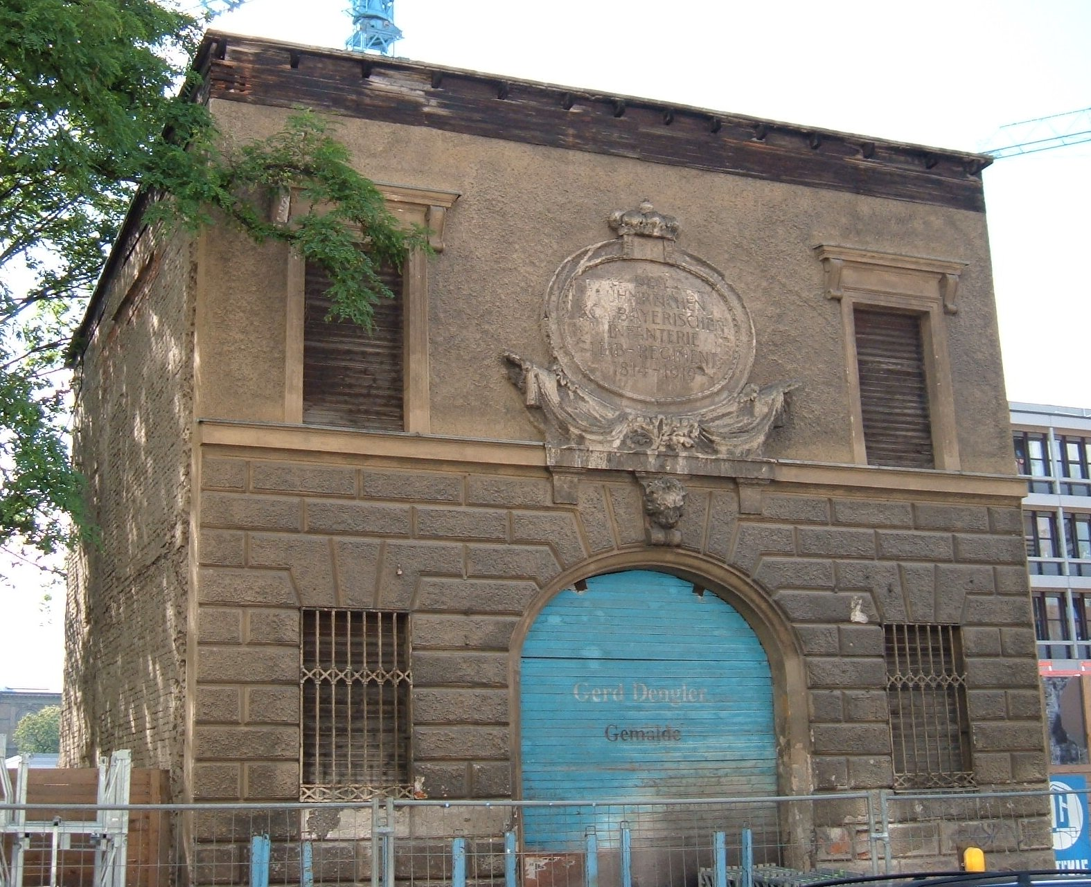 Türkentor